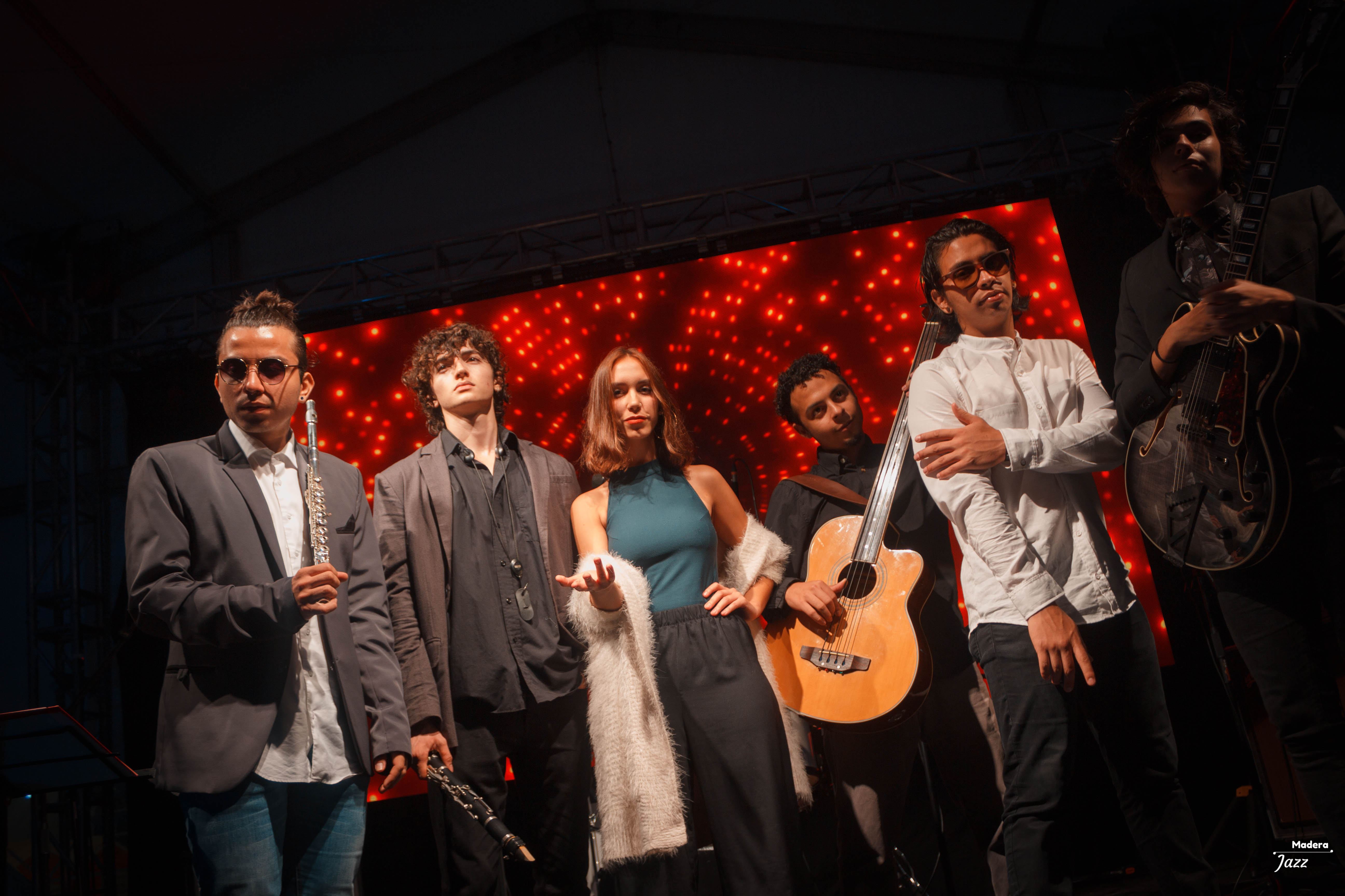 Grupo joven de Jazz de Medellín, que cada vez gana más reconocimiento. Su principal objetivo es fomentar el Jazz en nuestra ciudad, y a su vez, trasladarlo a lo largo y ancho del país.